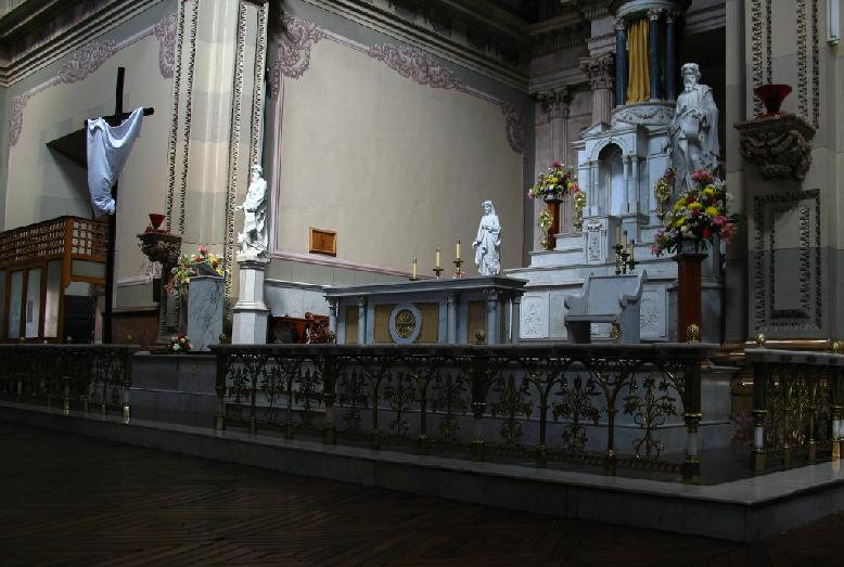 interior parroquia de san francisco